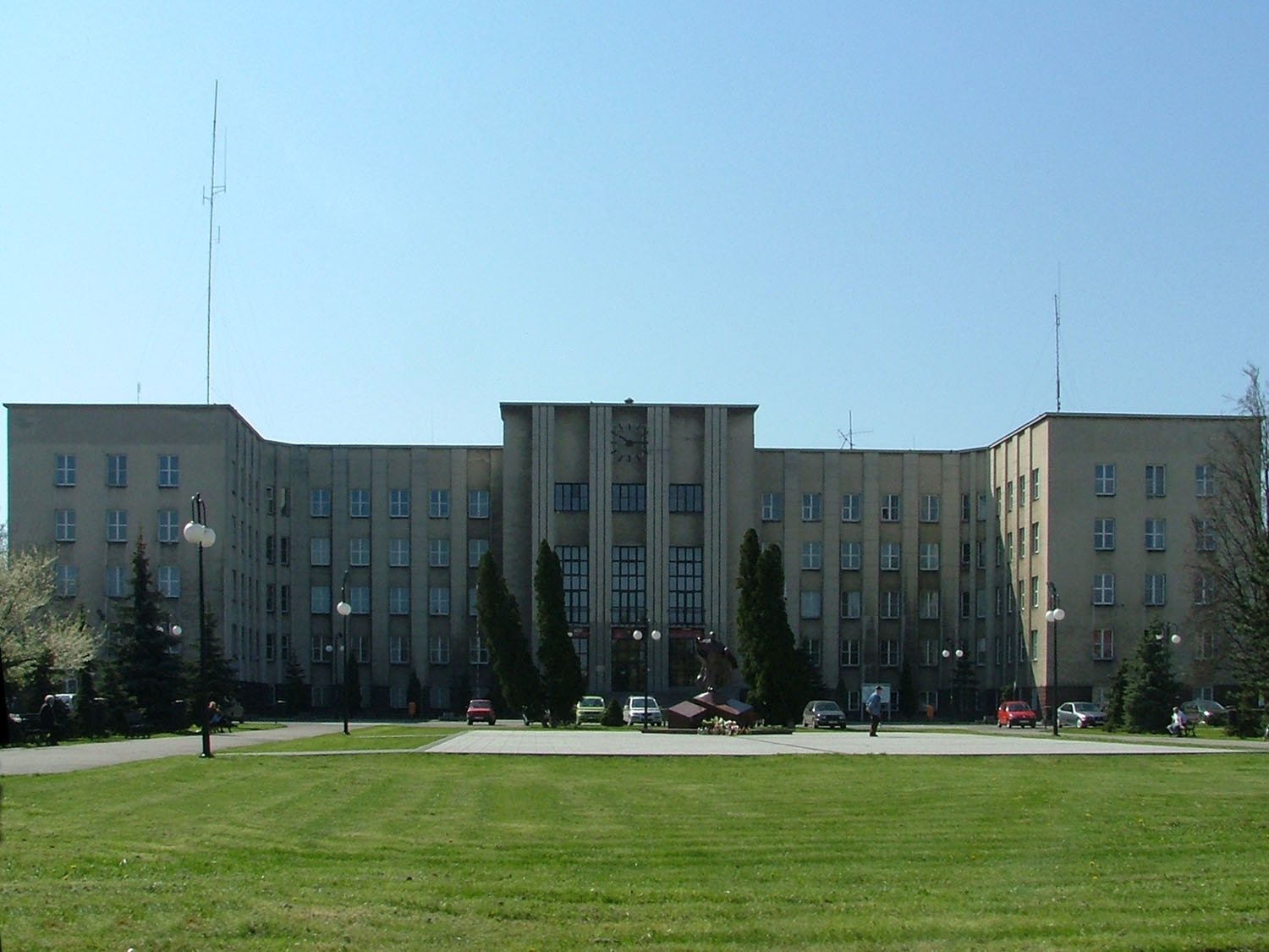 Chełm - siedziba Starostwa Powiatowego przy Placu Niepodległości, dawny Gmach Dyrekcji Kolejowej